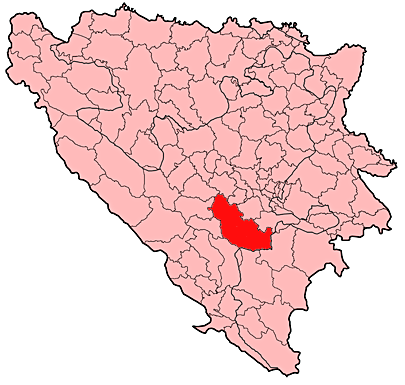 Prikaz općine Konjic u Bosni i Hercegovini